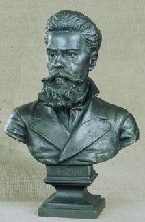 Nikolay Robertovich Bah (1853 – 1885)